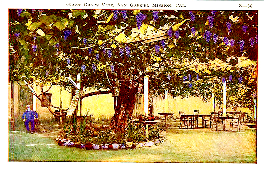 Vigne sur hautain à la mission Saint-Gabriel Californie